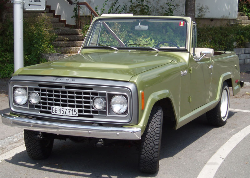 Jeep Commando, C-104, 1972, Besitzer Olivier Mischon, Foto auf öffentlichem Platz